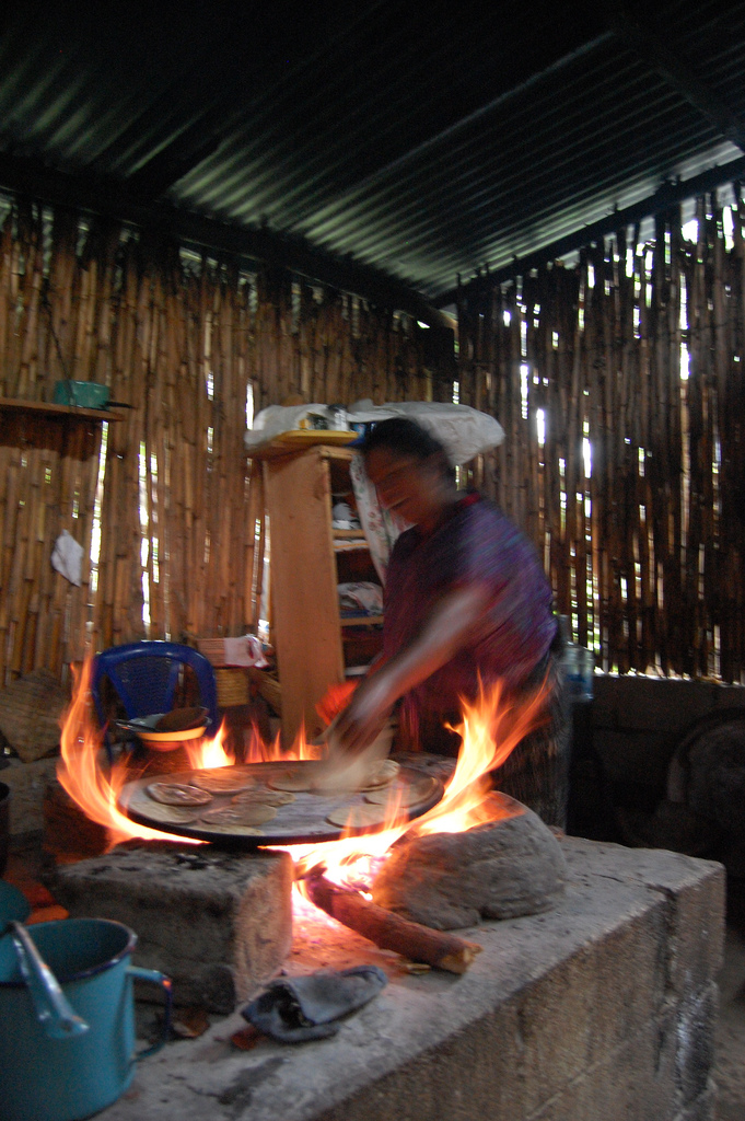 Una mujer guatemalteca hace tortillas de maíz, empleando un comal calentado con leña